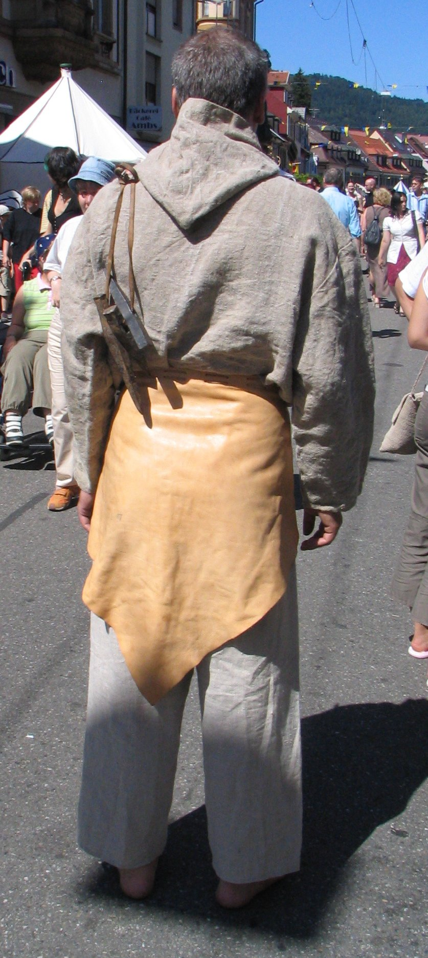 Nach Original aus hanfenem Stoff nachgeschneiderte Bergmannskleidung des 13. Jahrhunderts mit dreieckigem Arschleder und Satz Bergeisen